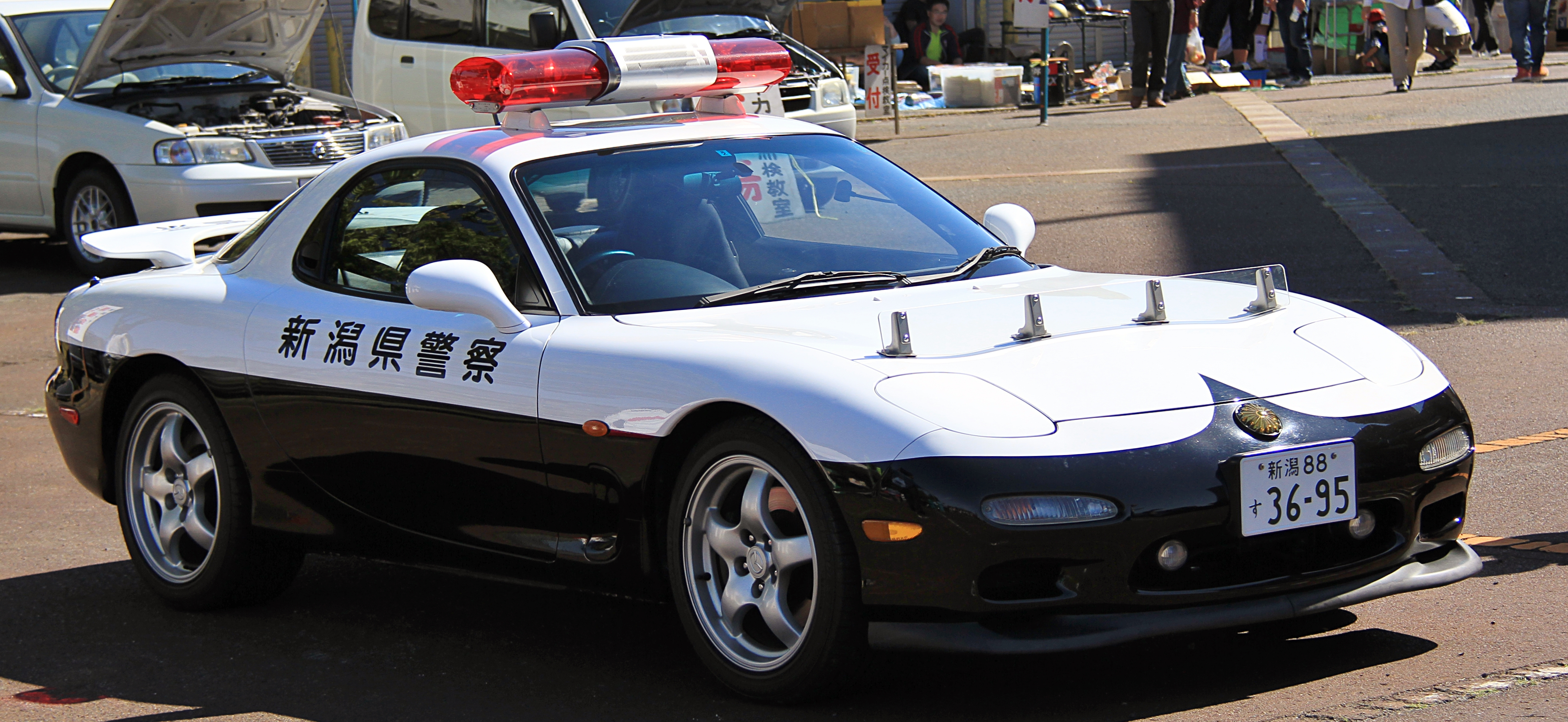 Mazda RX-7